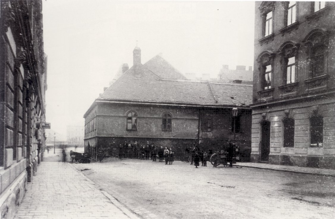 Der Rote von Westen aus gesehen, Buchengasse 67, Wien-Favoriten